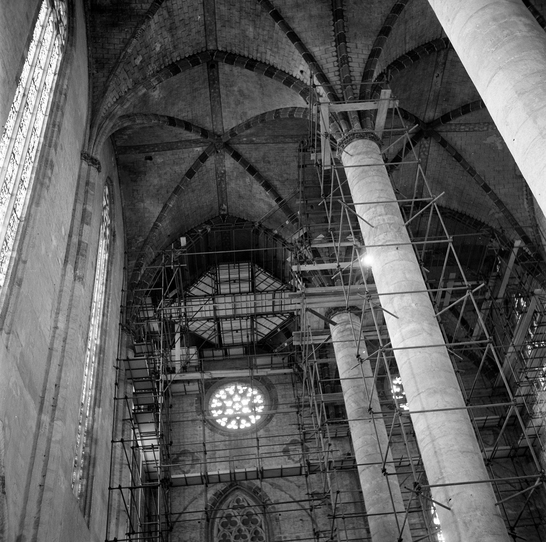 Eglise des Jacobins. Le 27 Avril 1964. Vue de l'intérieur en restauration de l'église des Jacobins.